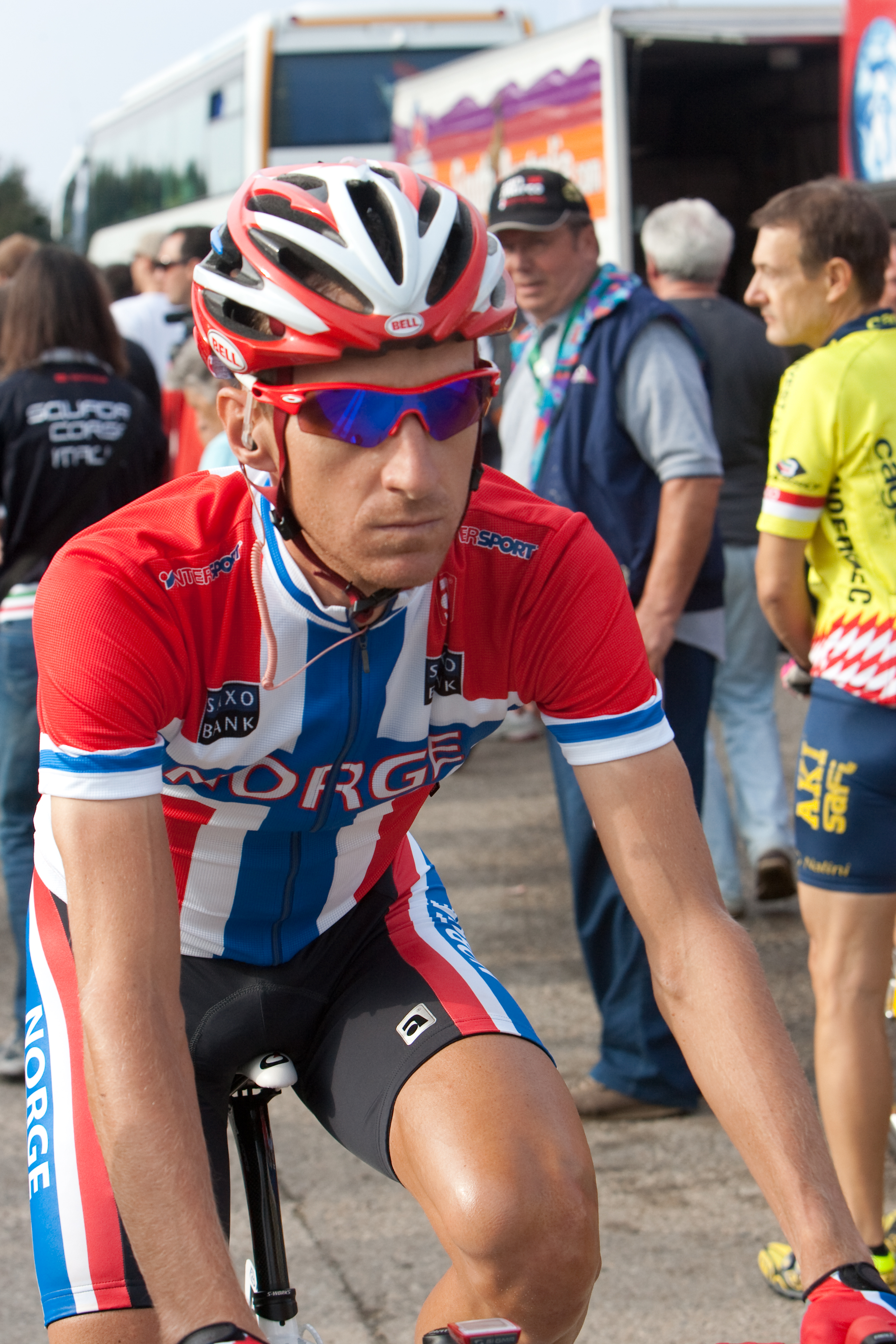 Kurt-Asle Arvesen aux championnats du monde à Mendrisio en 2009.